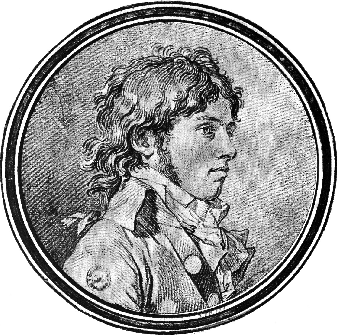 Louis-Roland Trinquesse (um 1745–1799): Der Maler Jean-Urbain Guérin (1760–1836). Rötel, ø 17 cm. Musée Carnavalet. Ausstellung Colson, Vestier, Trinquesse, Dijon 1969, Nr. 66.